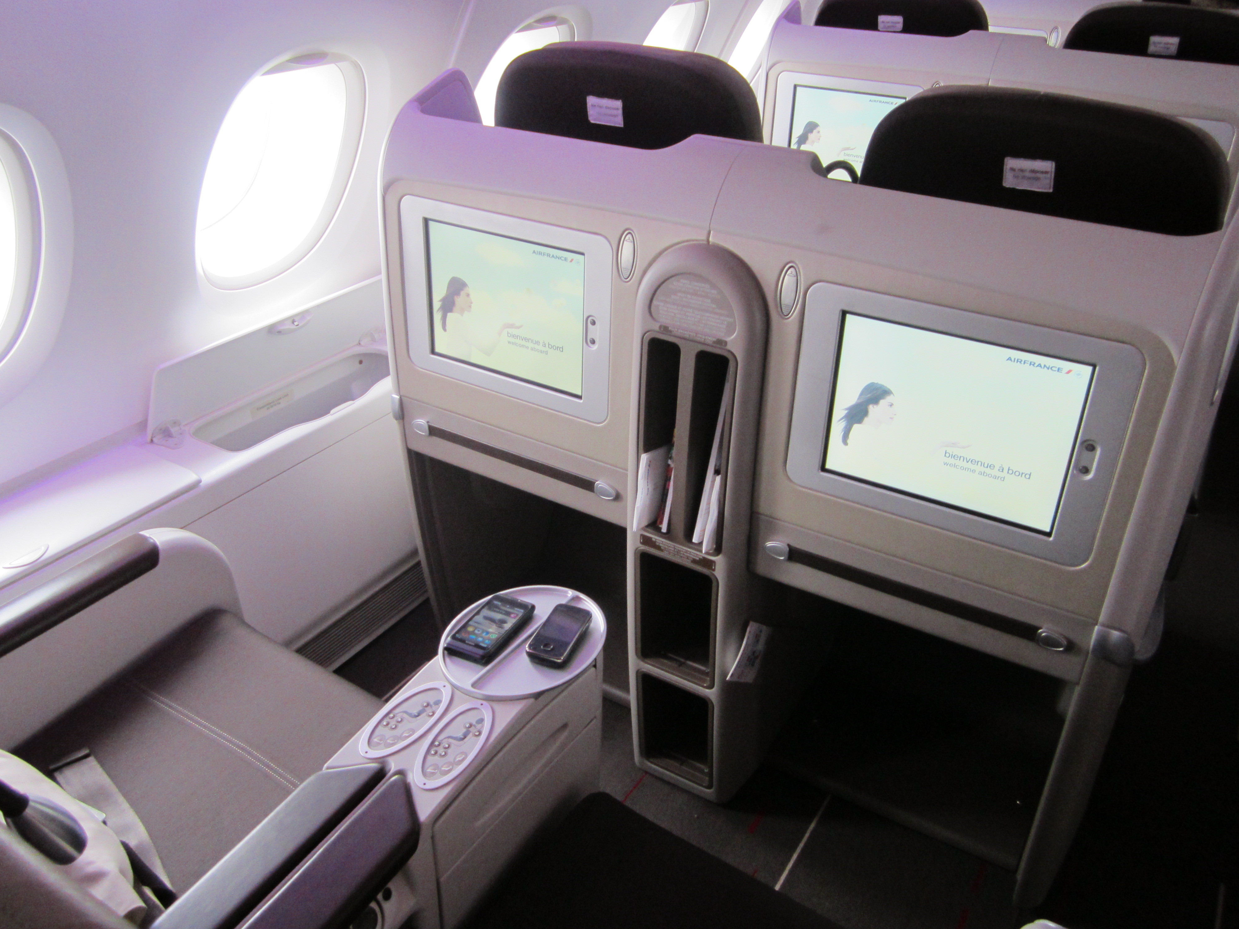 Die Sitze der Affaires-Klasse von Air France im A380.